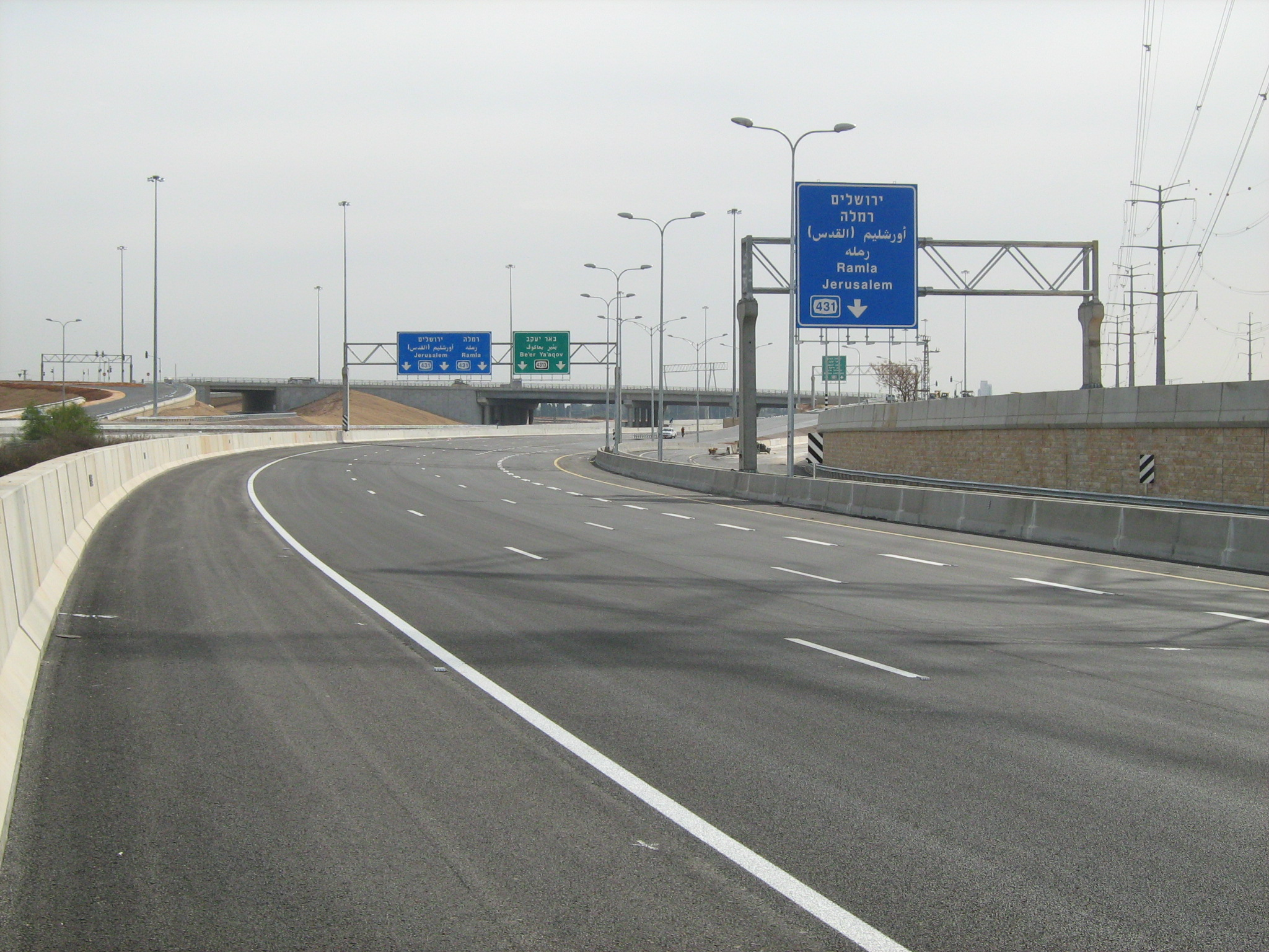 כביש 431 - מבט מזרחה לעבר מחלף נס ציונה